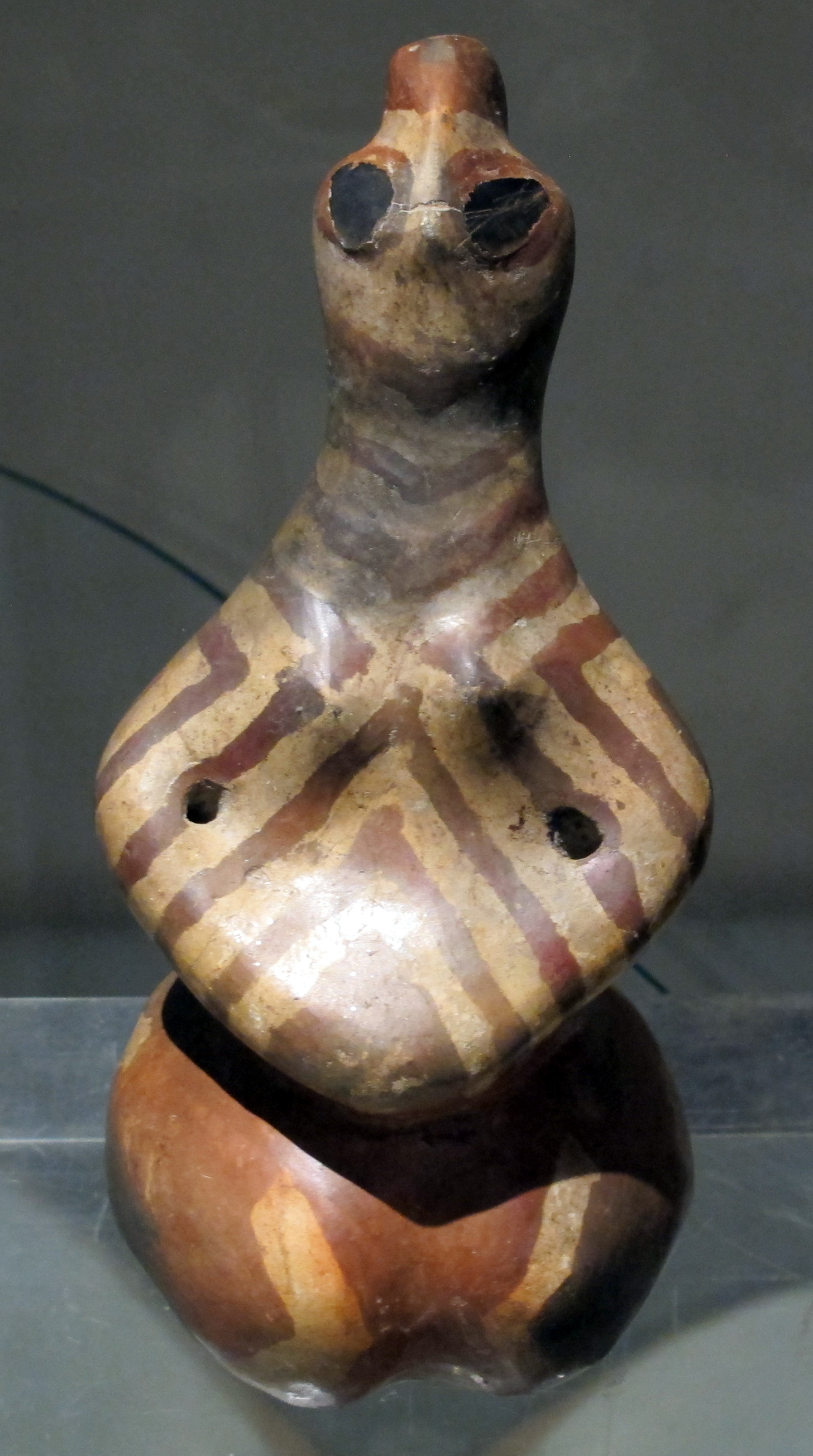 Roma, Museo nazionale di arte orientale (palazzo Brancaccio). Figurina femminile in terracotta (argilla beige decorata con pittura rossa e occhi in ossidiana). Dall'area di Haçilar (Anatolia sud-occidentale), tra Neolitico finale e Calcolitico iniziale, fine del VI-inizi del V millennio a.C.